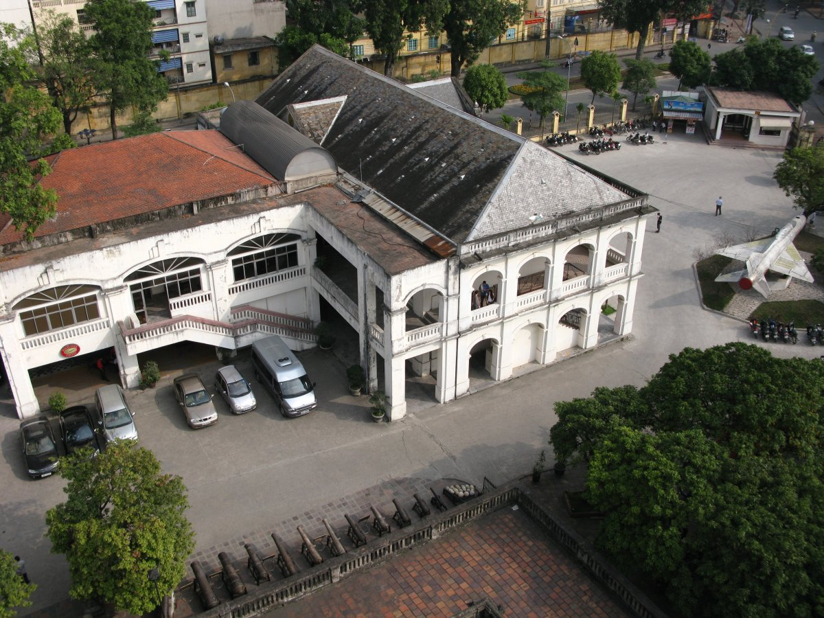 Музей Армии (Ханой)